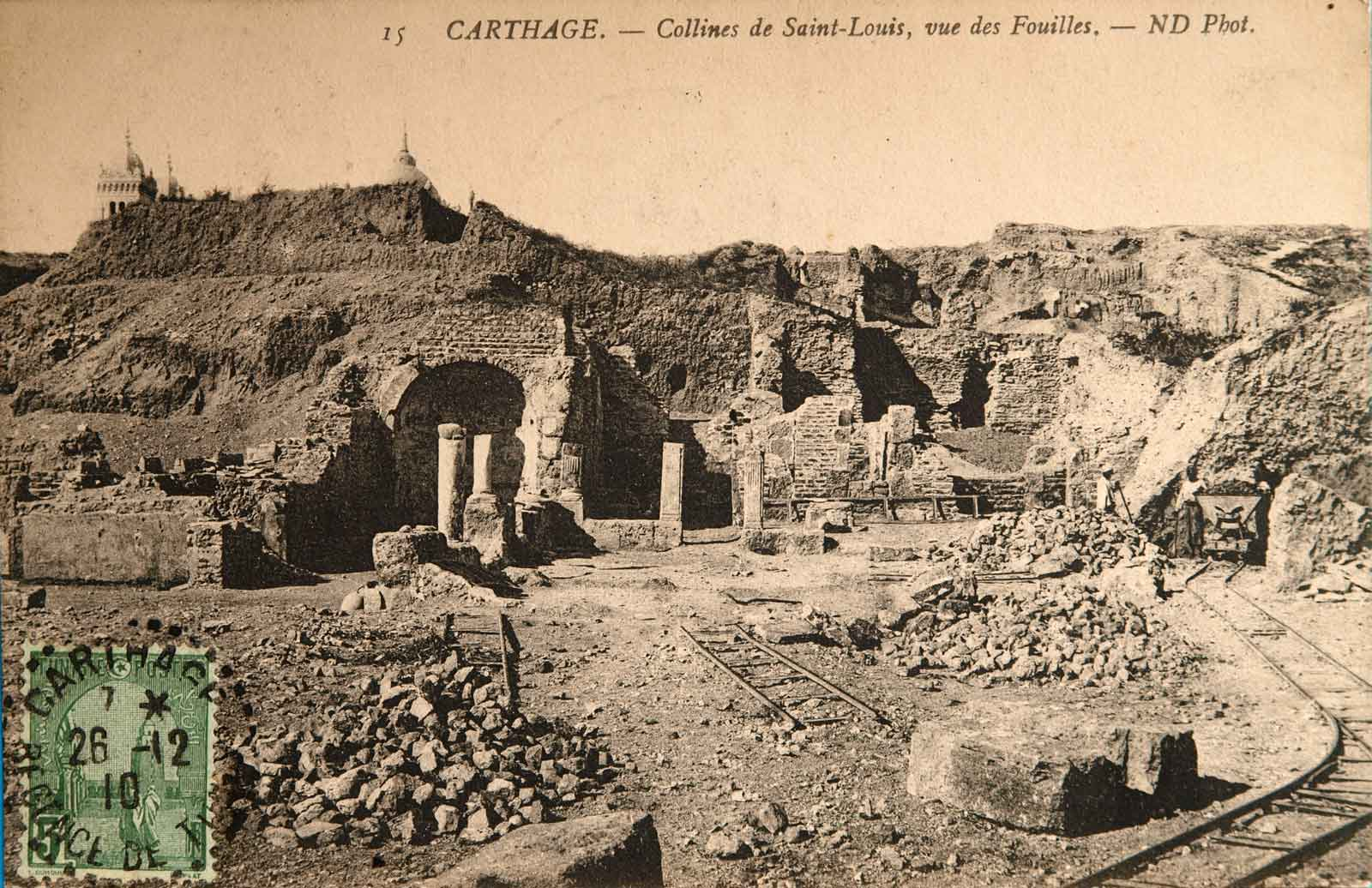 Les Fouilles autour de la cathédrale Saint-Louis de Carthage, Tunisie